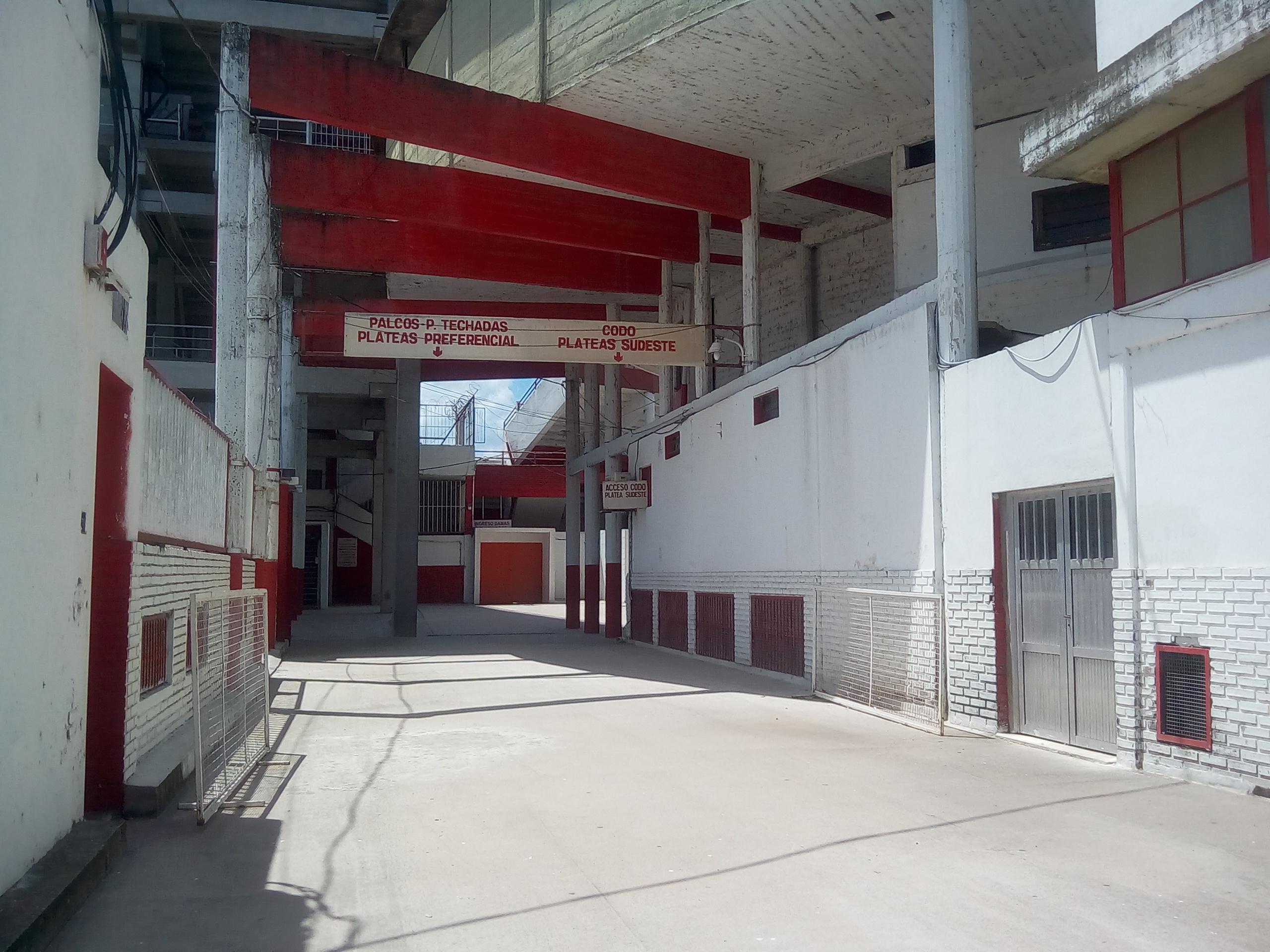 Entrada a plateas "Preferencial" y "Sudeste" y a palcos del Estadio "15 de Abril" del Club Unión de Santa Fe, en Avenida López y Planes 3513, Ciudad de Santa Fe, Argentina.